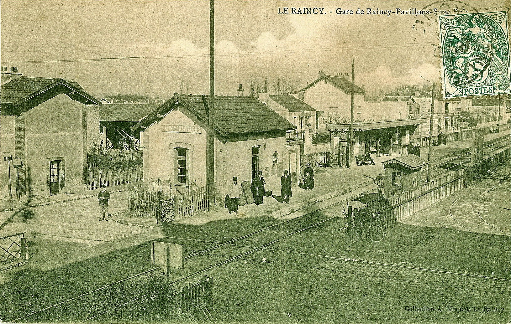 Carte postale ancienne éditée par MoquetLE RAINCY : Gare de de Raincy-PavillonsIl s'agit de la première gare des Pavillons. A noter le croisement, au premier plan, de la ligne des Coquetiers par une voie de tramway